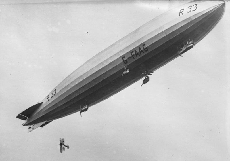 Der Zeppelin als Flugzeug-Mutterschiff! Der Start eines Flugzeuges vom Flugzeug-Mutter-Luftschiff "R. 33" während der Fahrt.